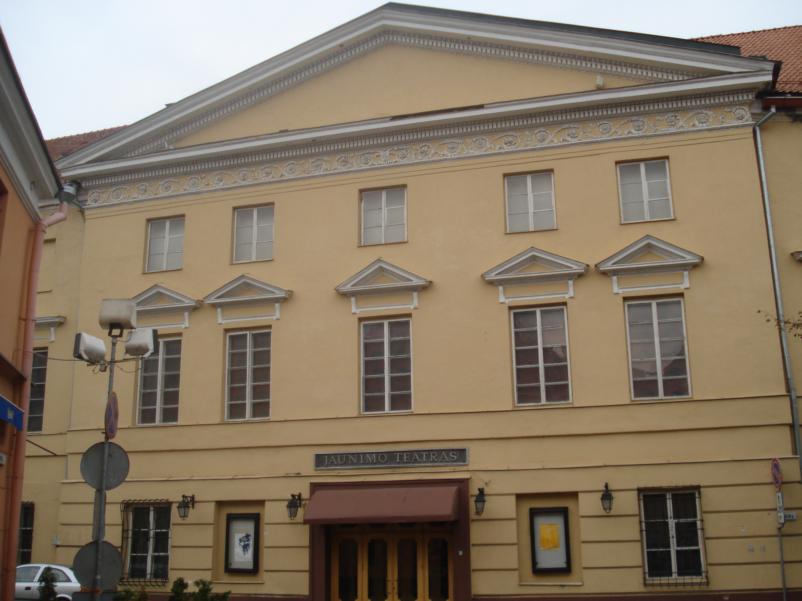 Oginsky Palace in Vilnius (Oginskių rūmai, Arklių gatvė); now State Youth Theatre (Jaunimo teatras)